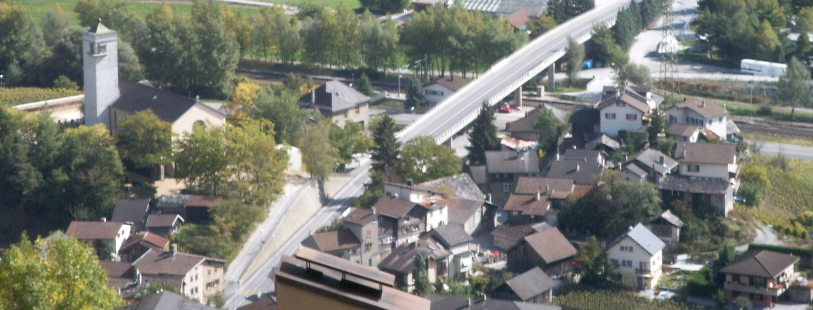 vue du vieux village de Noës/Sierre, Valais/Suisse